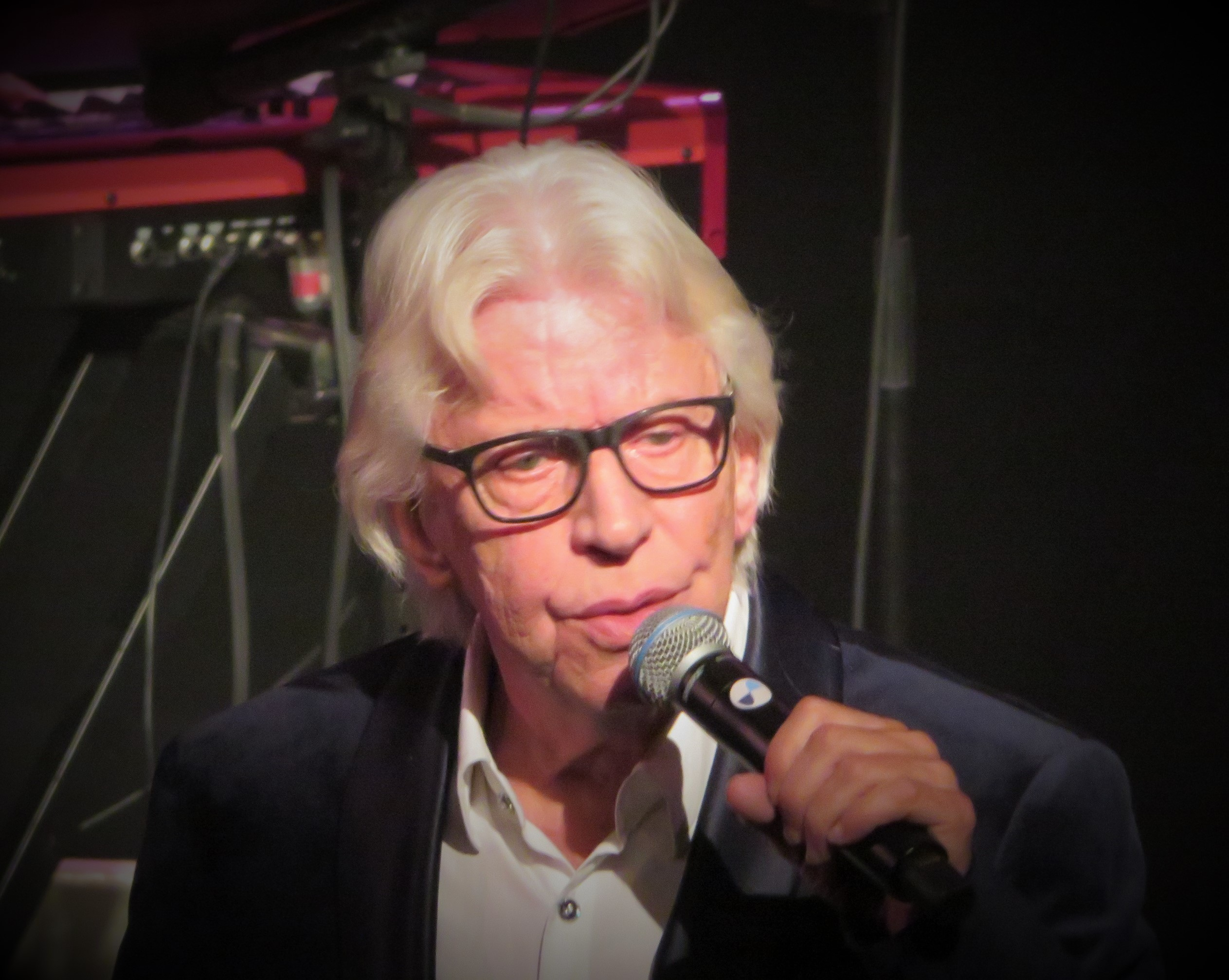 Rudy Bennett bij de première van de theatershow "Rot op met die Geraniums" in de Schouwburg Amstelveen op 13 oktober 2018